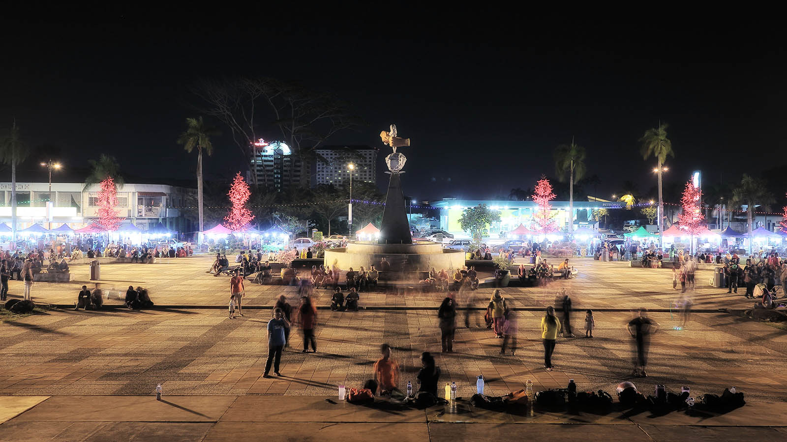 峇株巴辖帆加兰广场